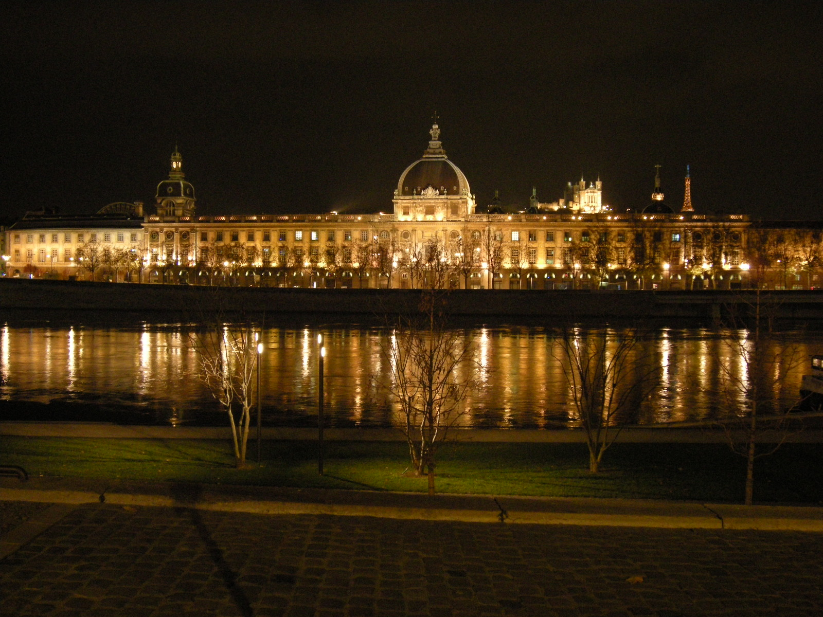 Lyon, França